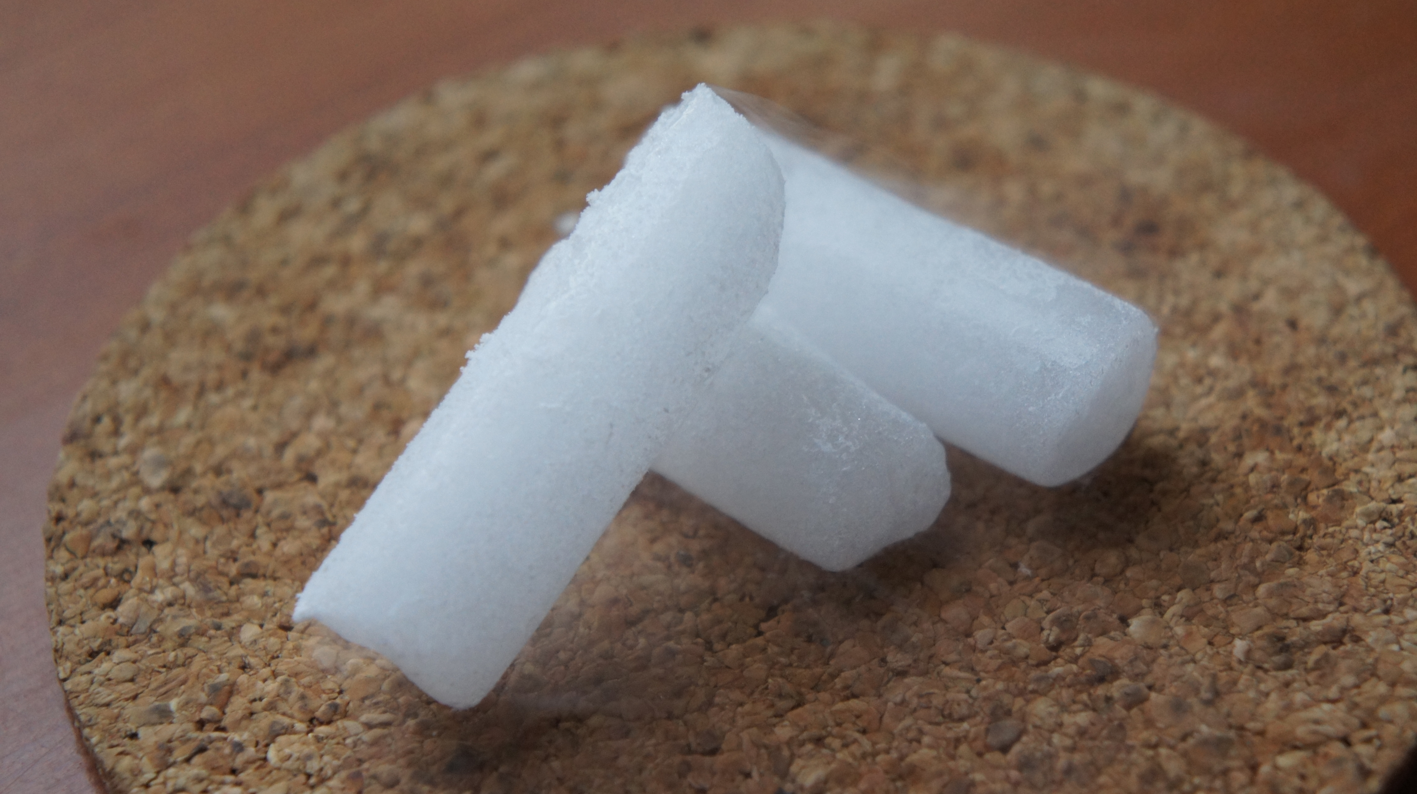 Suchy lód - dwutlenek węgla w stanie stałym.